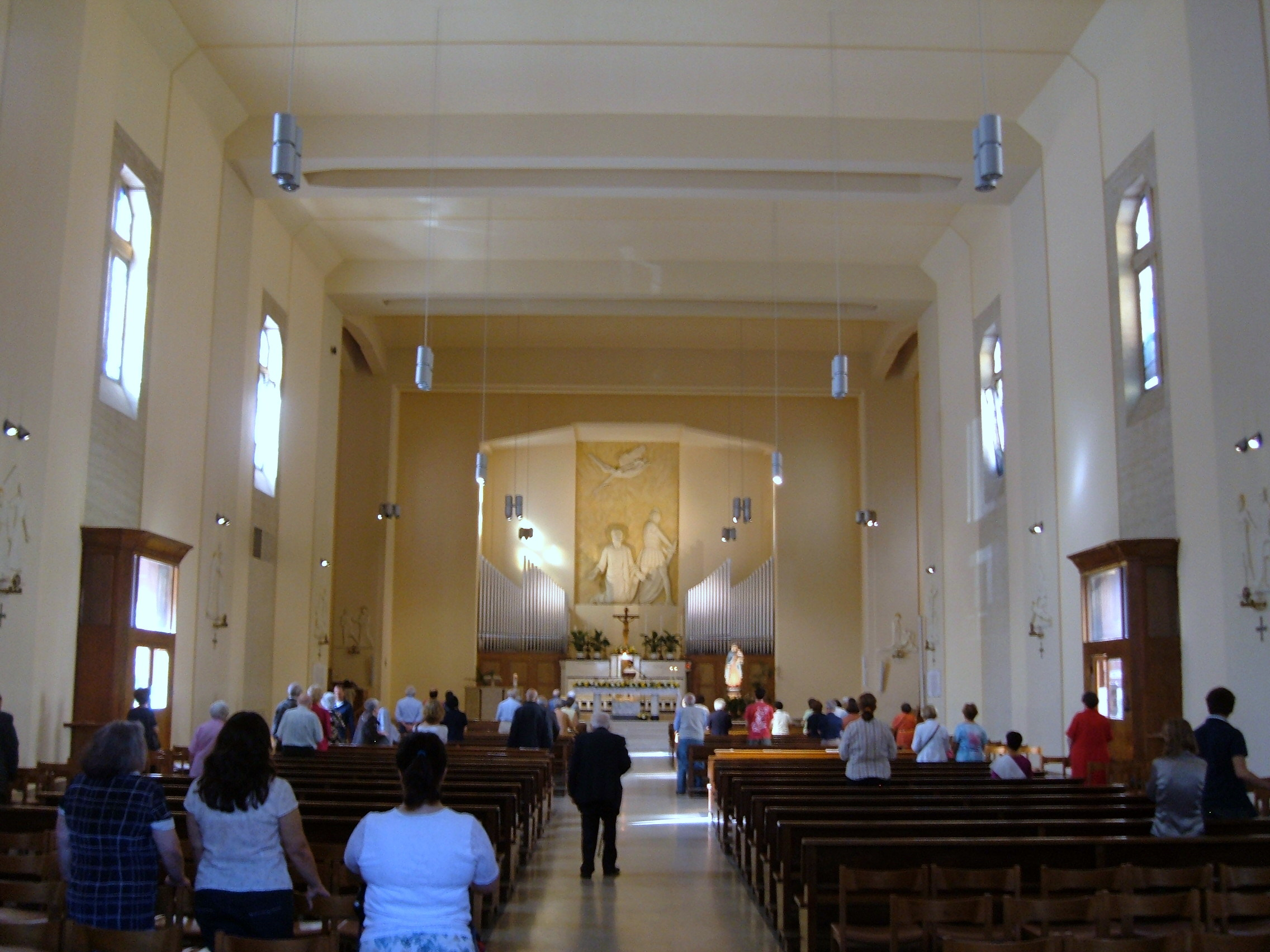 Chiesa di San Saturnino, a Roma, nel quartiere Trieste.